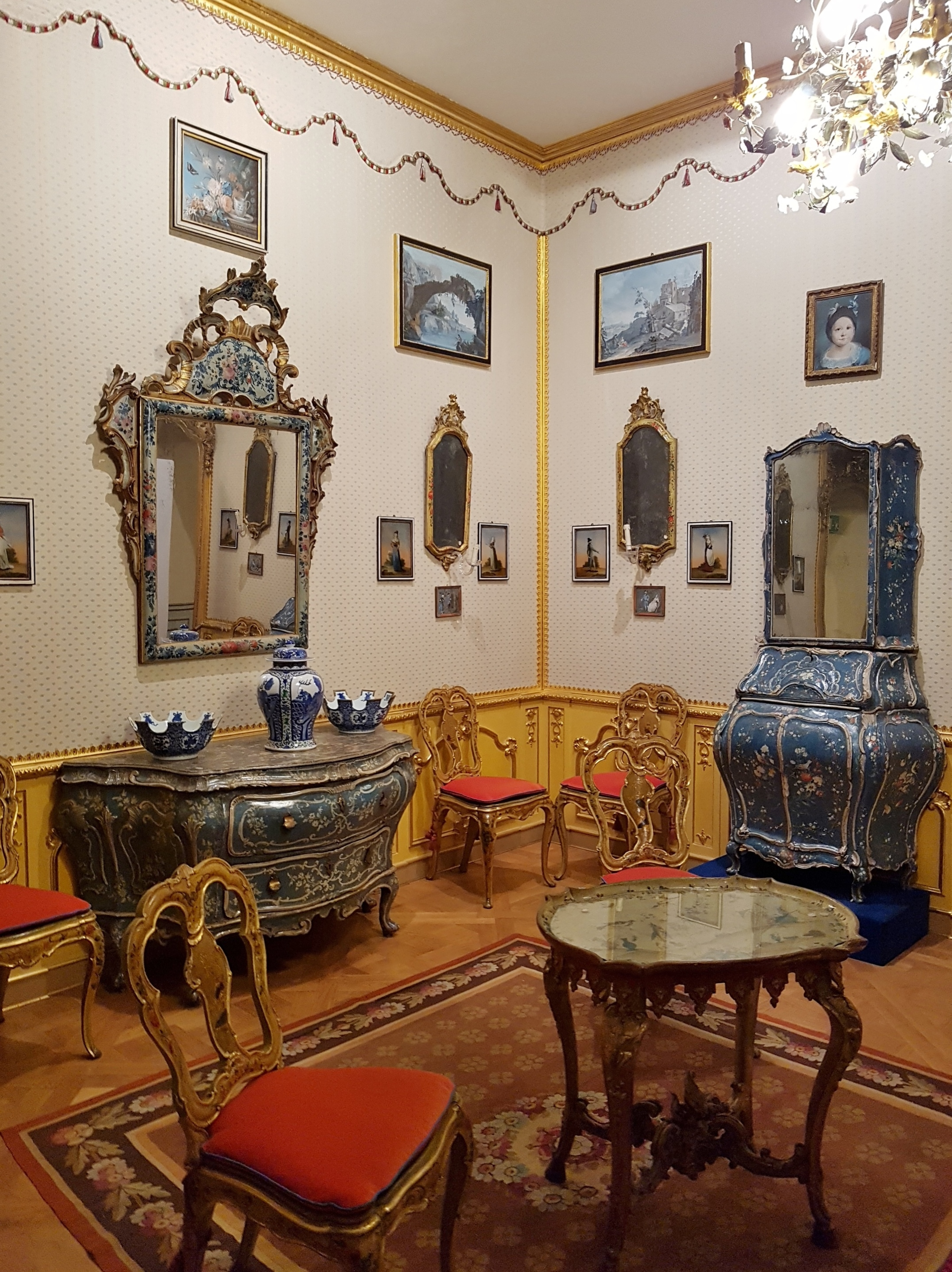 Sala Veneziana, Museo di Arti Decorative Accorsi–Ometto, Torino